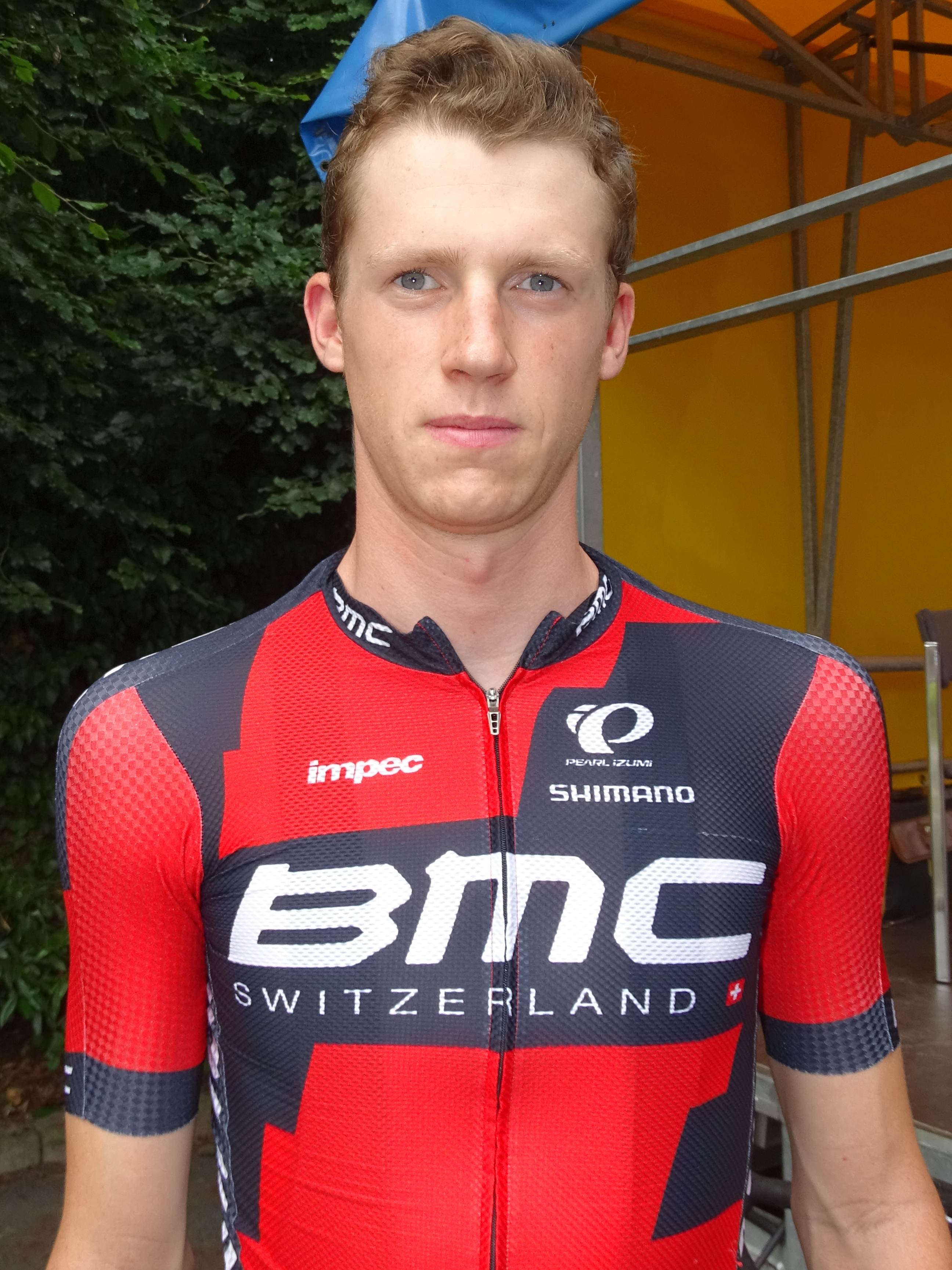 Reportage réalisé le samedi 4 juillet à l'occasion du départ et de l'arrivée du Circuit Het Nieuwsblad espoirs 2015 à Grotenberge (Zottegem), Belgique.